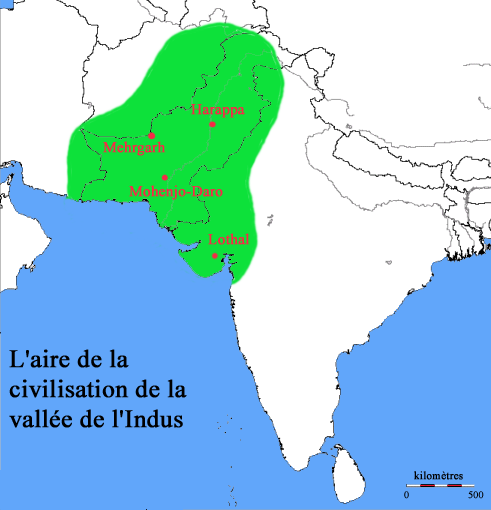 carte de l'aire de la civilisation de l'Indus